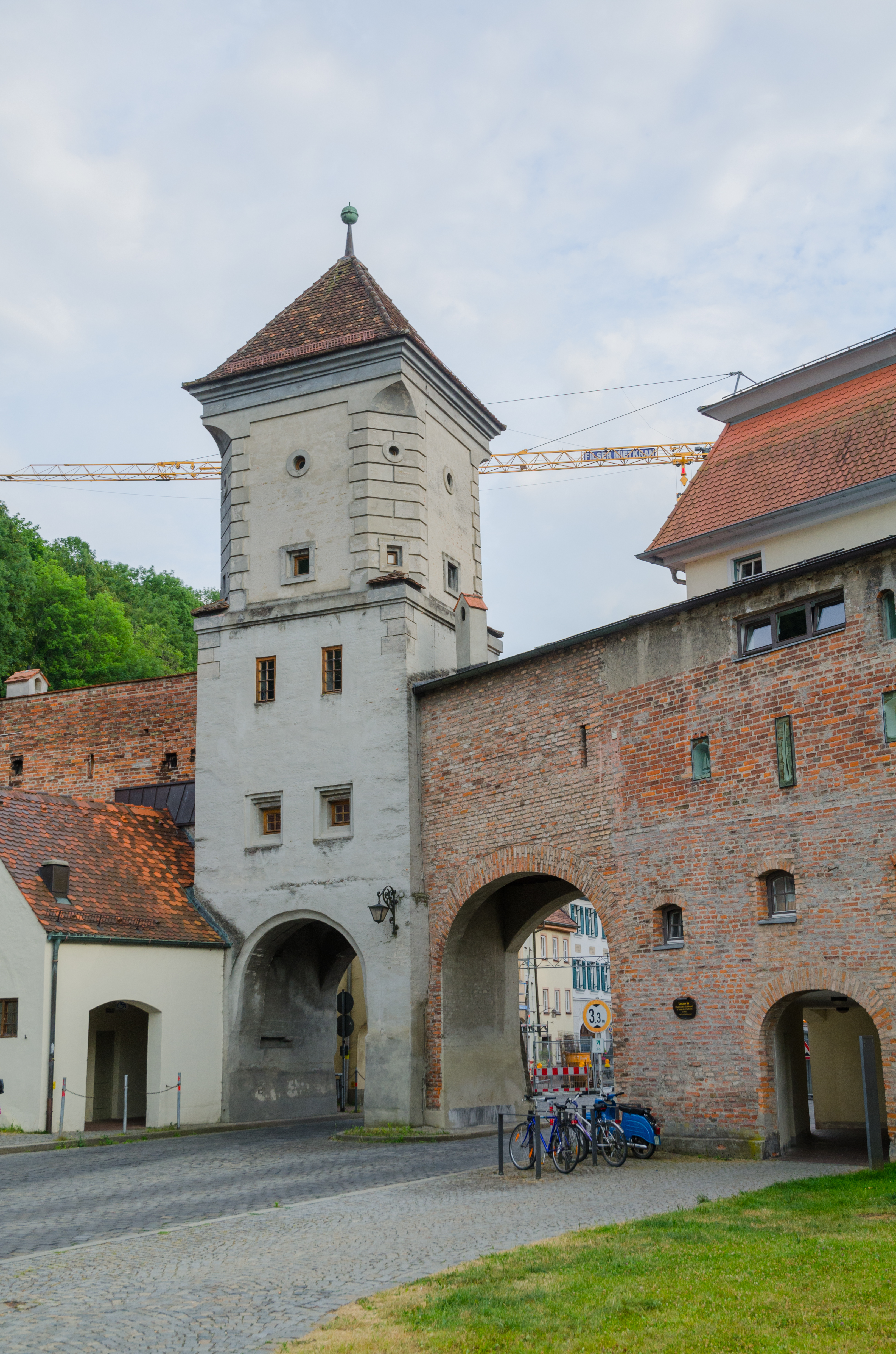 Landsberg am Lech, Stadtbefestigung, Sandauertor